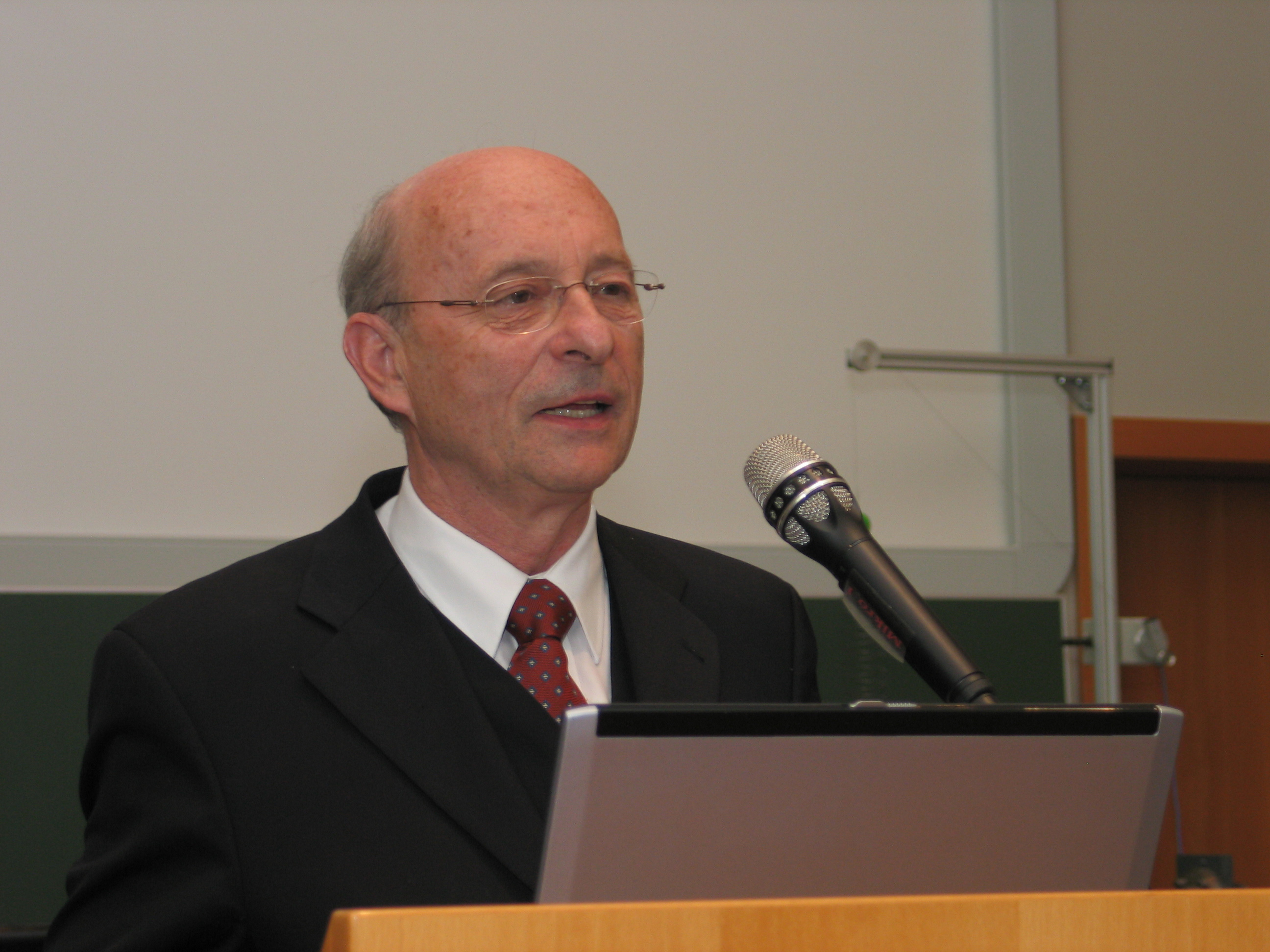 Prof. Bernd Johannsen. Amtswechsel im FZR, feierliche Amtseinführung von Prof. Roland Sauerbrey und Verabschiedung von Prof. Bernd Johannsen als Wissenschaftliche Direktoren des FZR, Datum: 03.05.2006